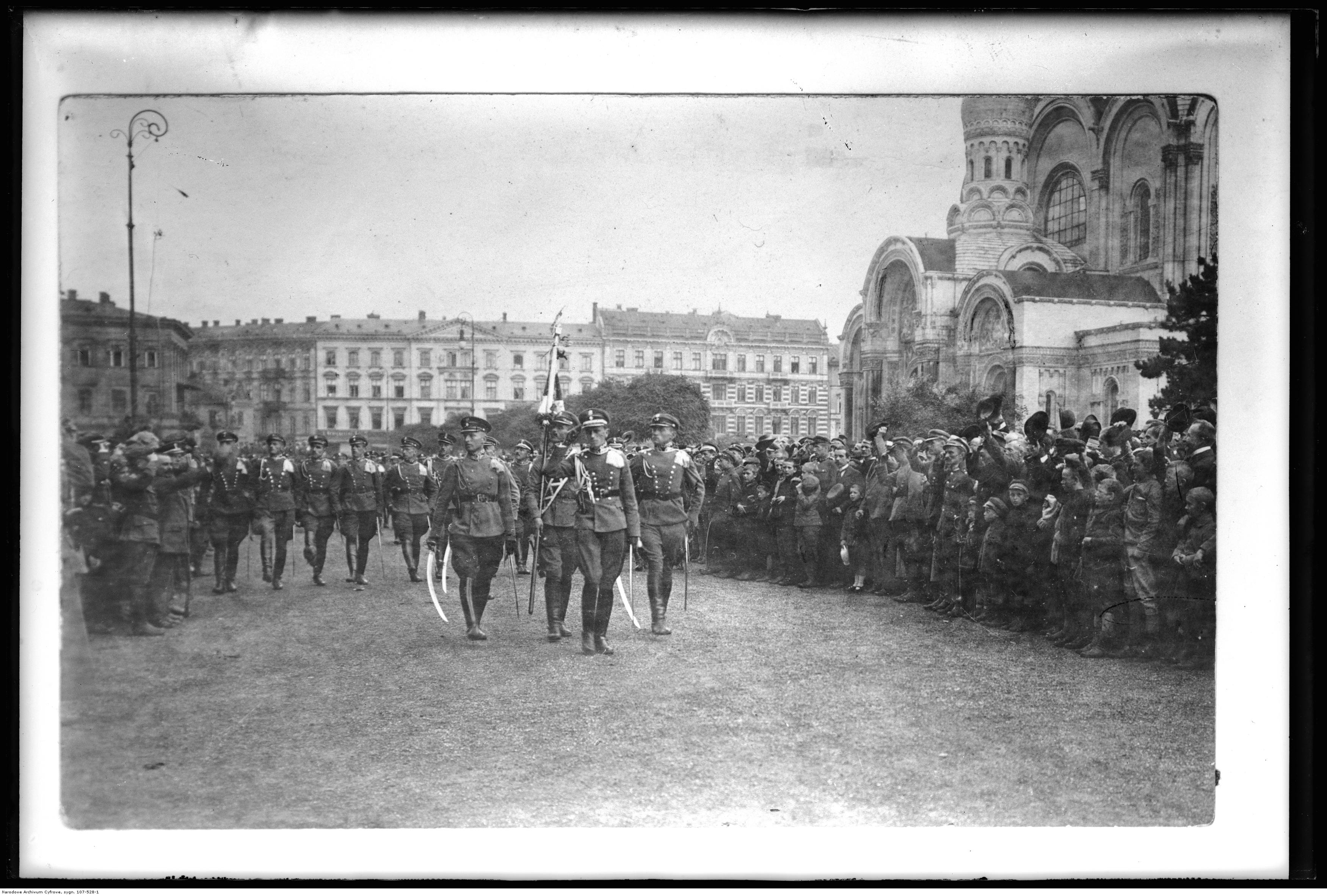 Defilada - na pierwszym planie poczet sztandarowy. Reprodukcja.